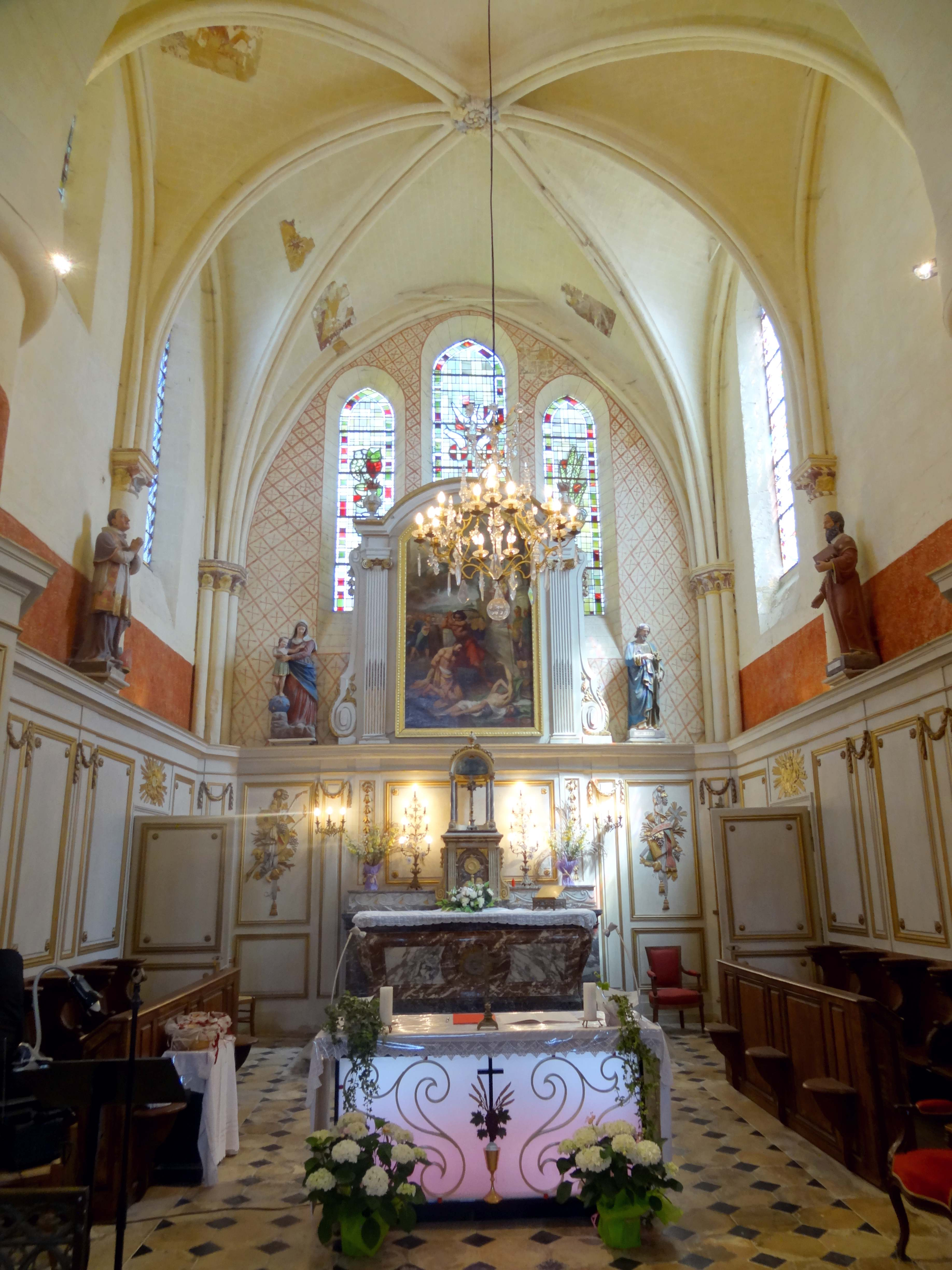 Intérieur de l'église - voir titre.